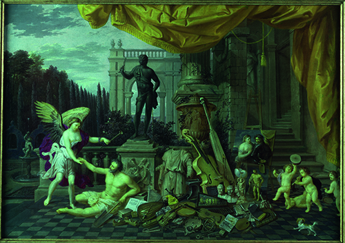 Theodoor Boeijermans, Allegorie van de stad Antwerpen, 1662-1664, doek, 84 x 118 cm